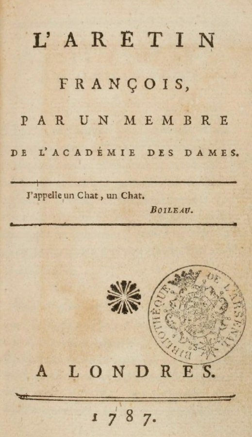 page de titre de L'Arétin François, 1787